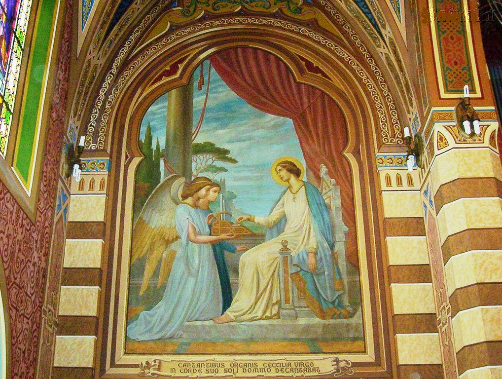 Afresco (1922) do pintor italiano Arnaldo Mecozzi, pintado numa das laterais da Catedral Nossa Senhora do Desterro, Jundiaí,SP-Brasil. Restaurado por Mauro Andreatti.